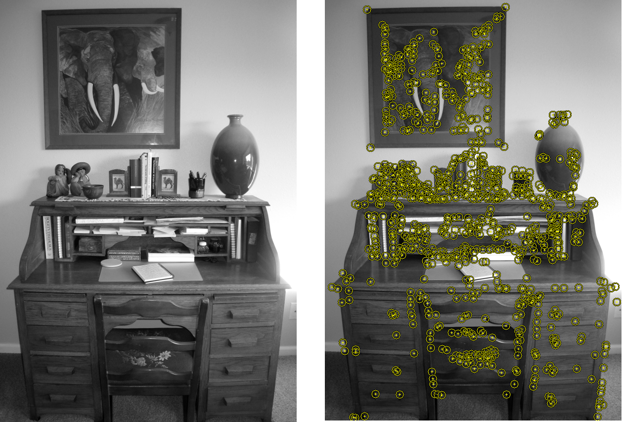 Un exemple de détecteur de caractéristiques : le détecteur de Harris. A gauche, l'image à traiter. A droite, le résultat. Les points jaunes (entourés de cercles pour la visibilité) correspondent aux points d'intérêt trouvés par la méthode de Harris. Il s'agit d'endroits où les contours changent brusquement de direction, ou, ce qui revient au même, s'intersectent. Le programme utilisé pour générer l'image de droite est disponible sur ce site.